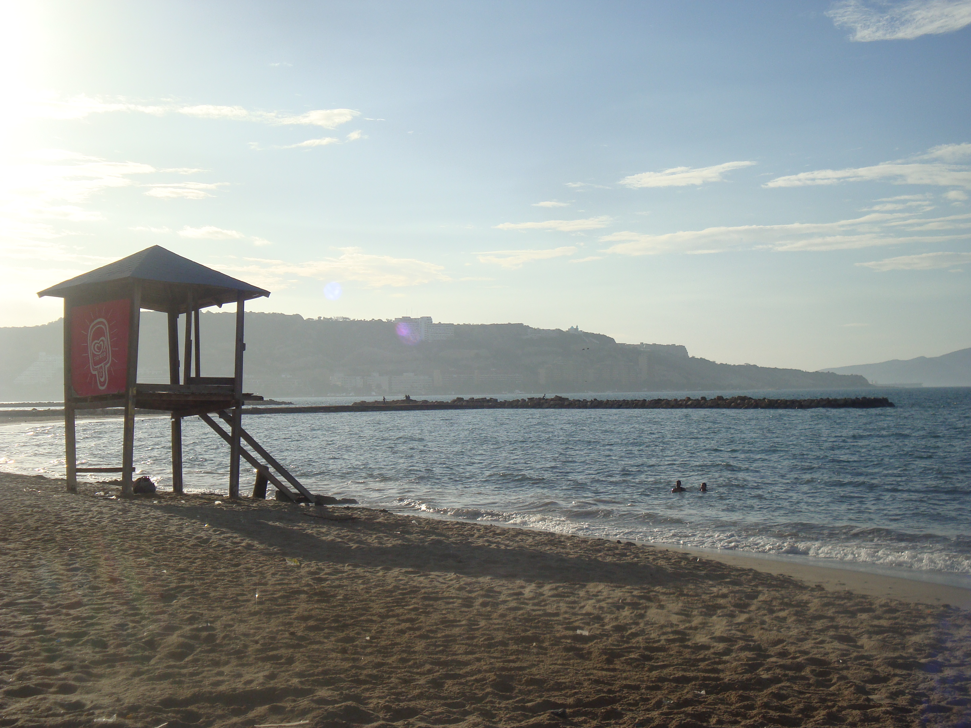 Una playa en Barcelona